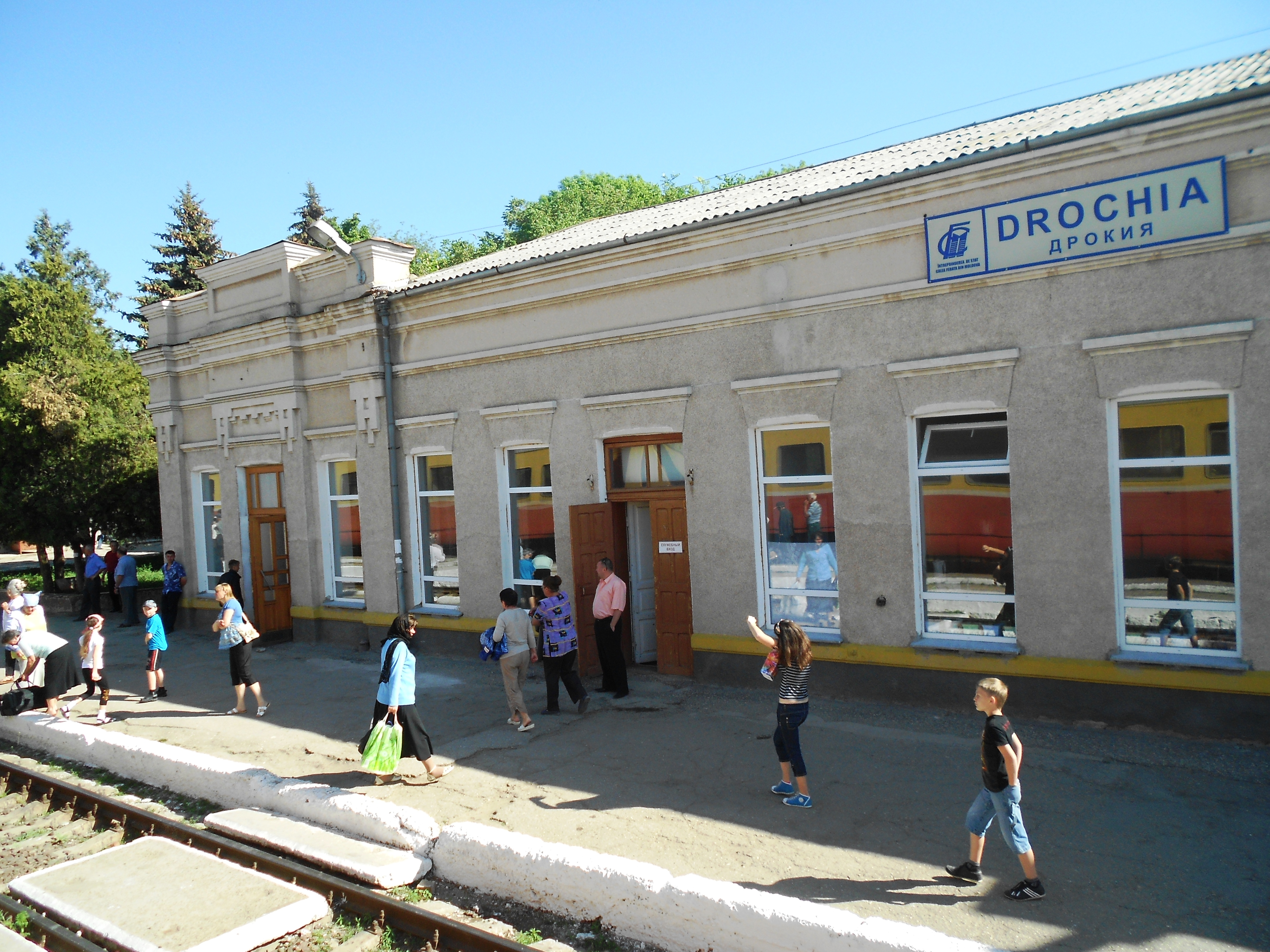 Gara Drochia, Moldova